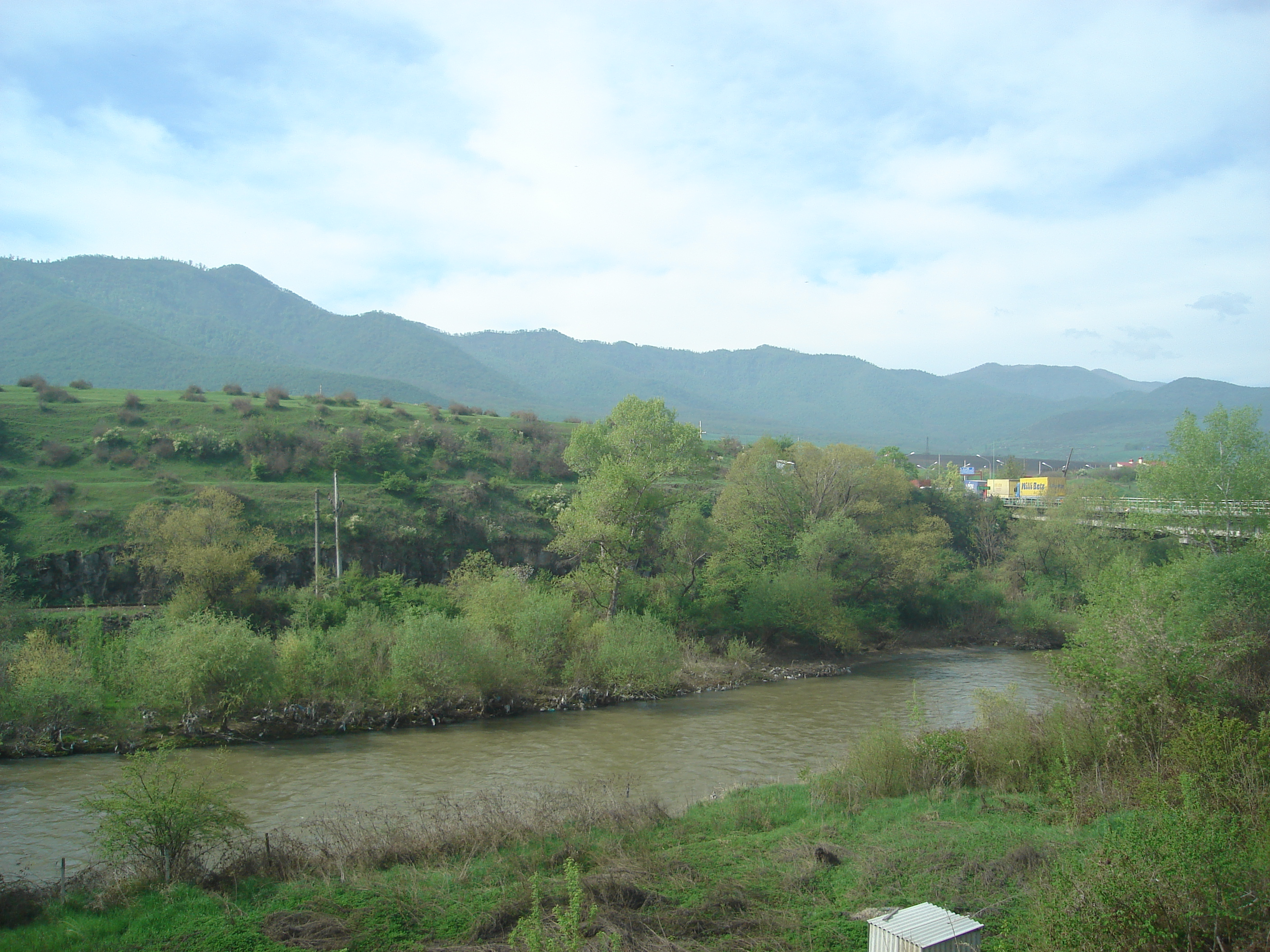 Debeda River at the Armenia-Georgia border. The Georgian side of the border is seen on this photo taken from the Armenian side. The bridge to the right serves as a “neutral zone” between the two countries.